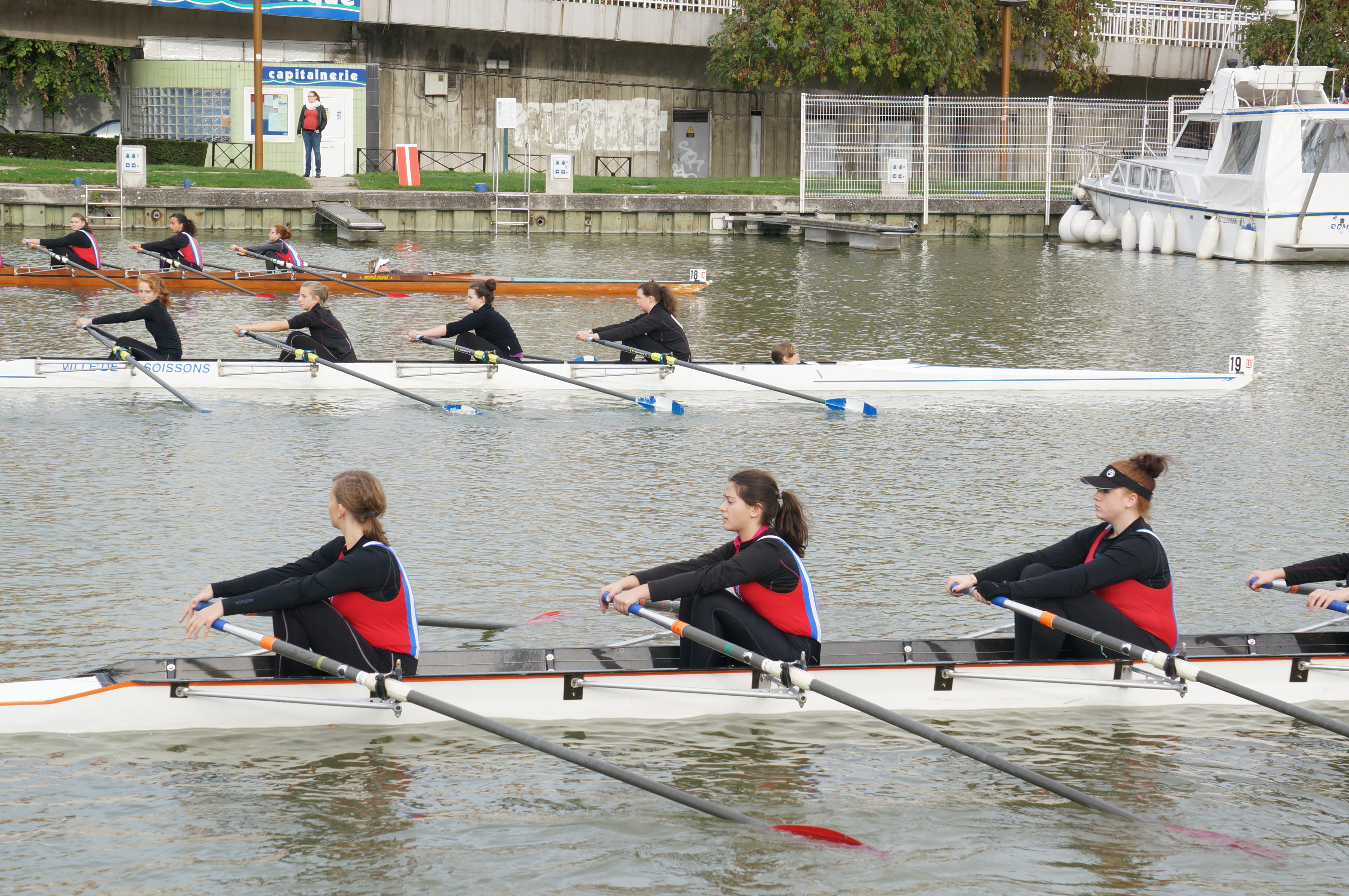 Course du 27 octobre 2013 à Reims.